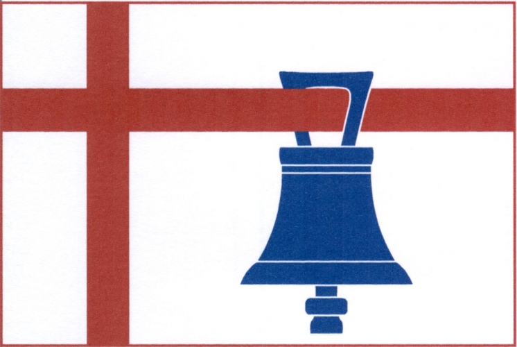 vlajka,Radhošť , okres Ústí nad Orlicí